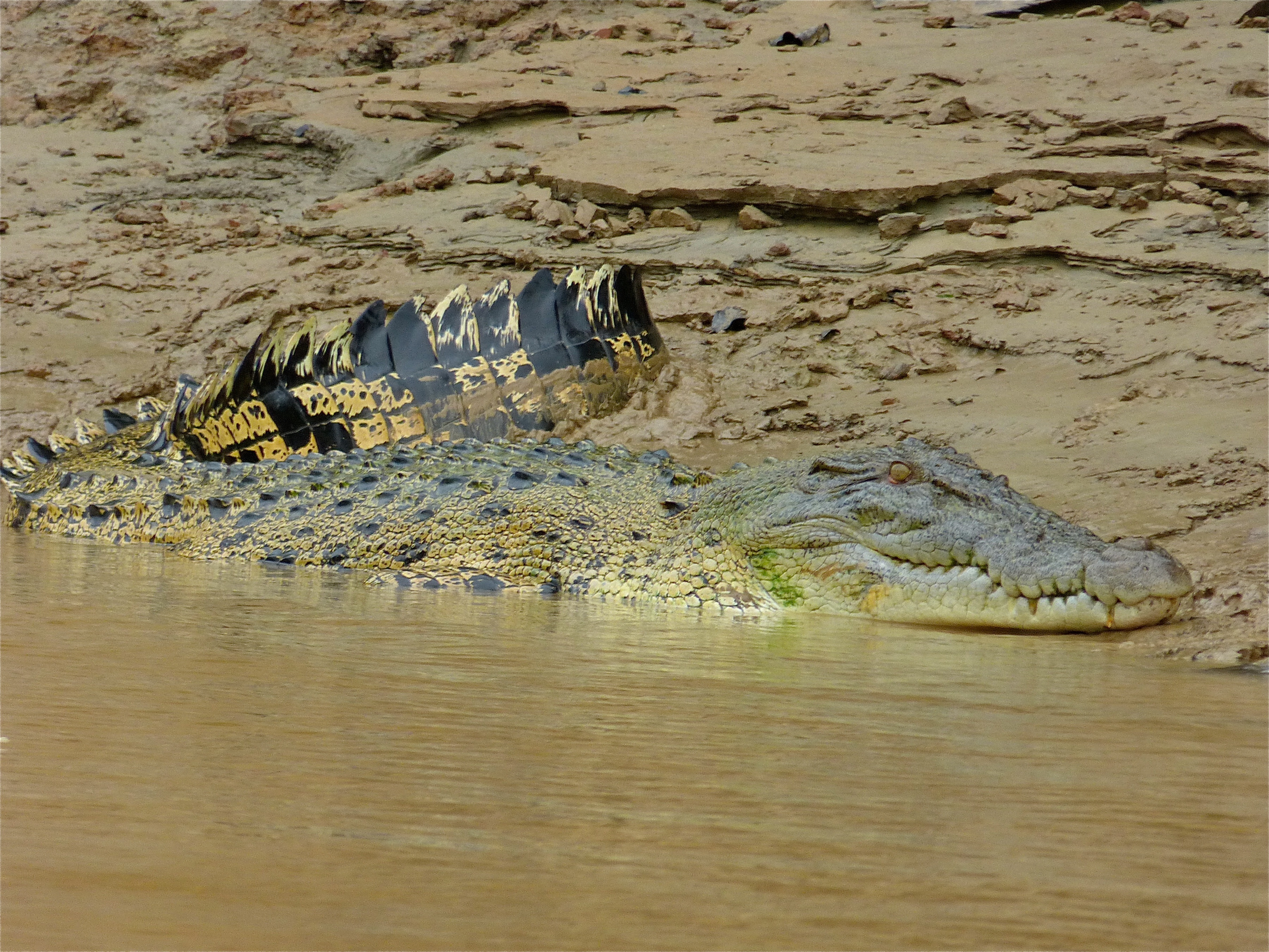 Kinabatangan River, Sabah, MALAYSIA